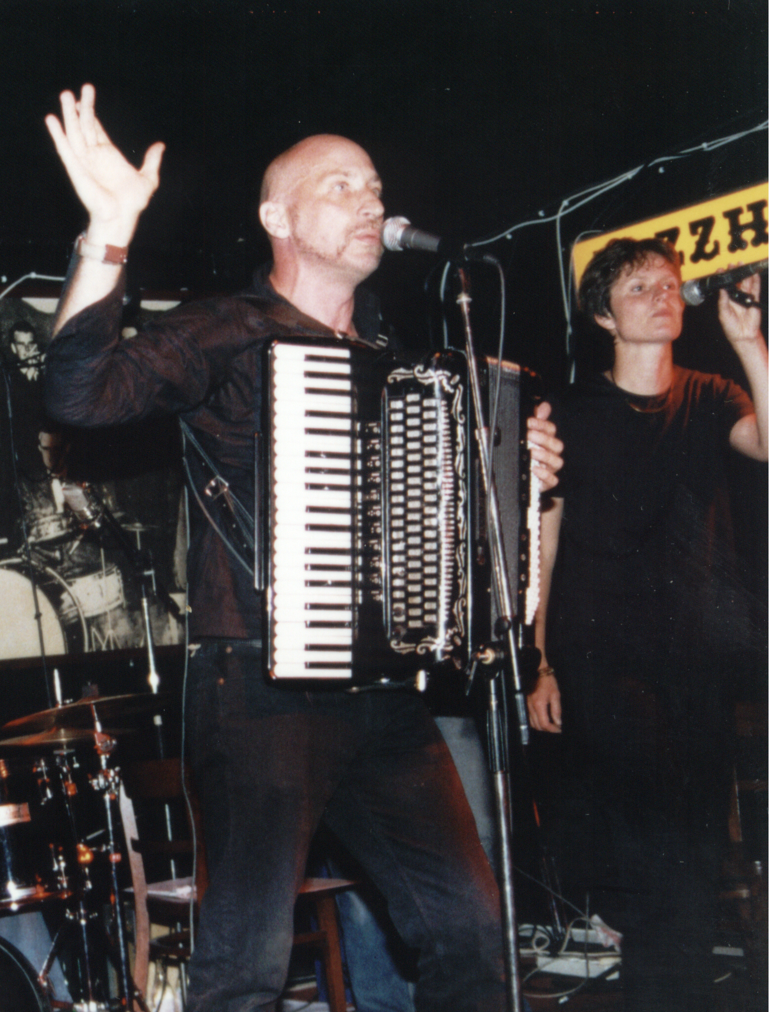 Universala Kongreso de Esperanto, Gotenburgo 2003. Esperanto Desperado, en Jazzhuset. Kim kaj Helle.